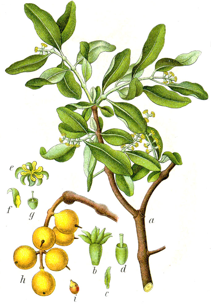 FloraWeb.de: Eichenmistel, Loranthus europaeus Jacq. Original Caption Eichen-Mistel, Loranthus europaeus